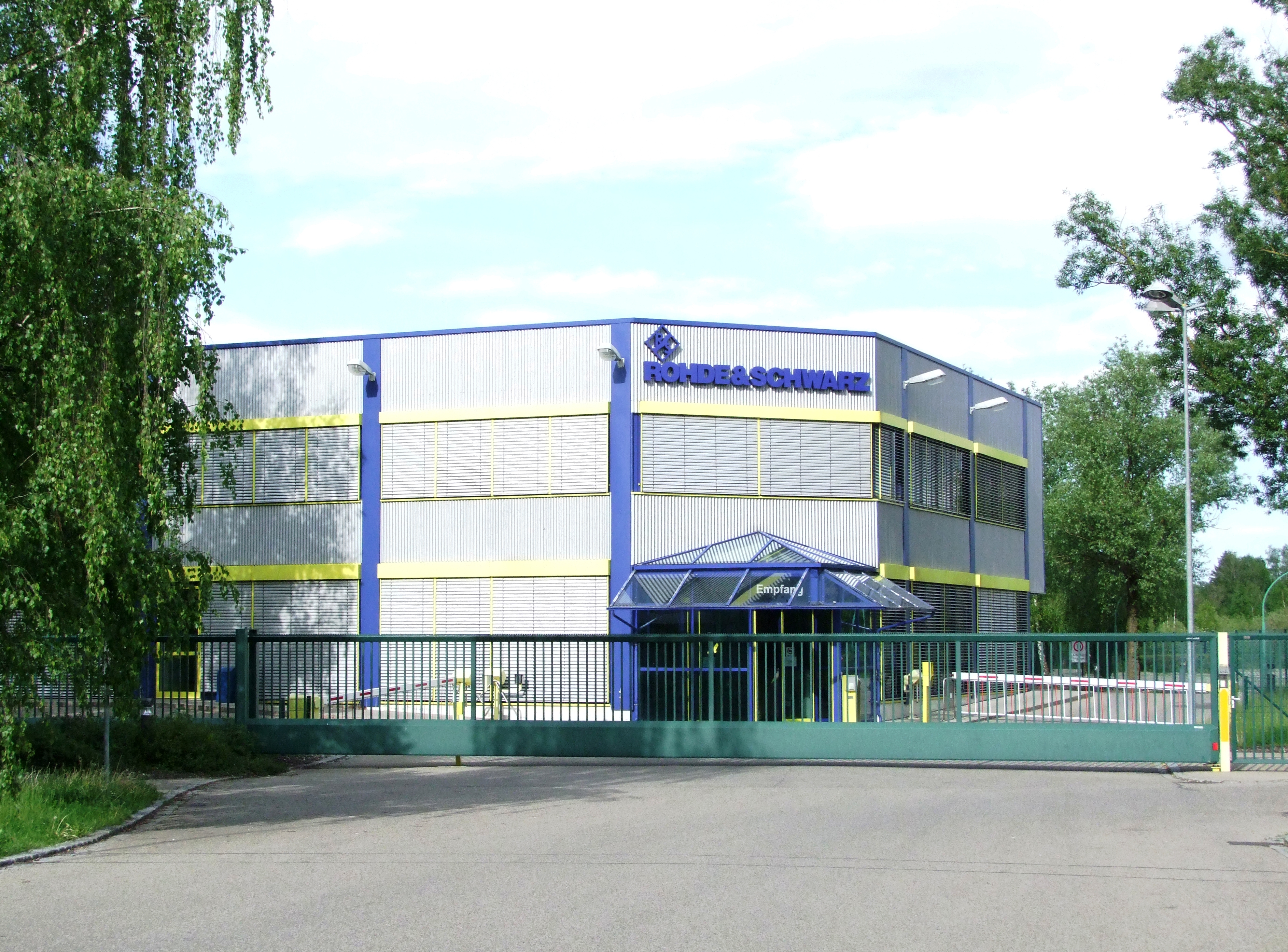 Eingangsgebäude von Rohde & Schwarz Messgerätebau in Memmingen